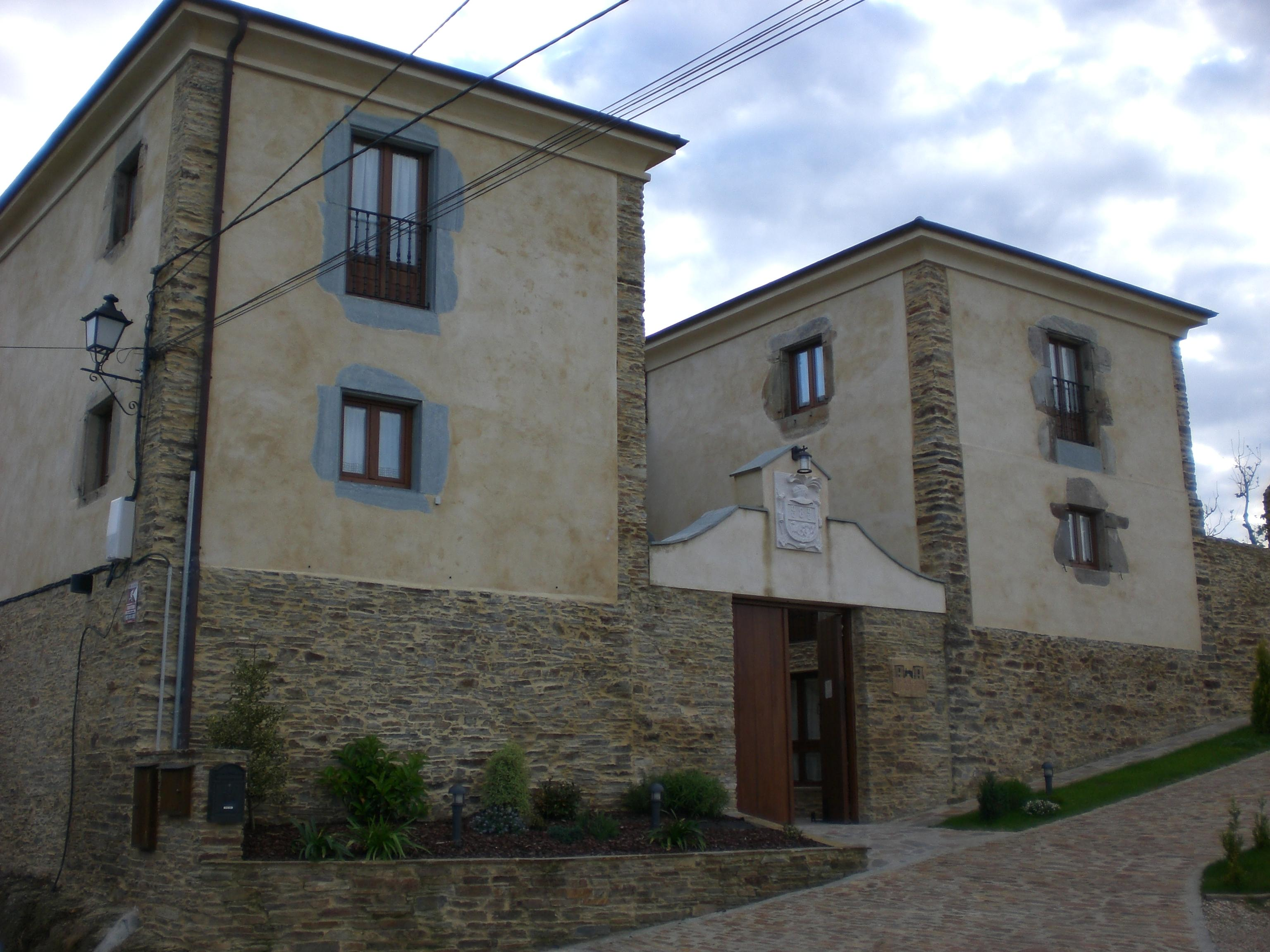 Casona de Trabadelo. Miou (Asturias).